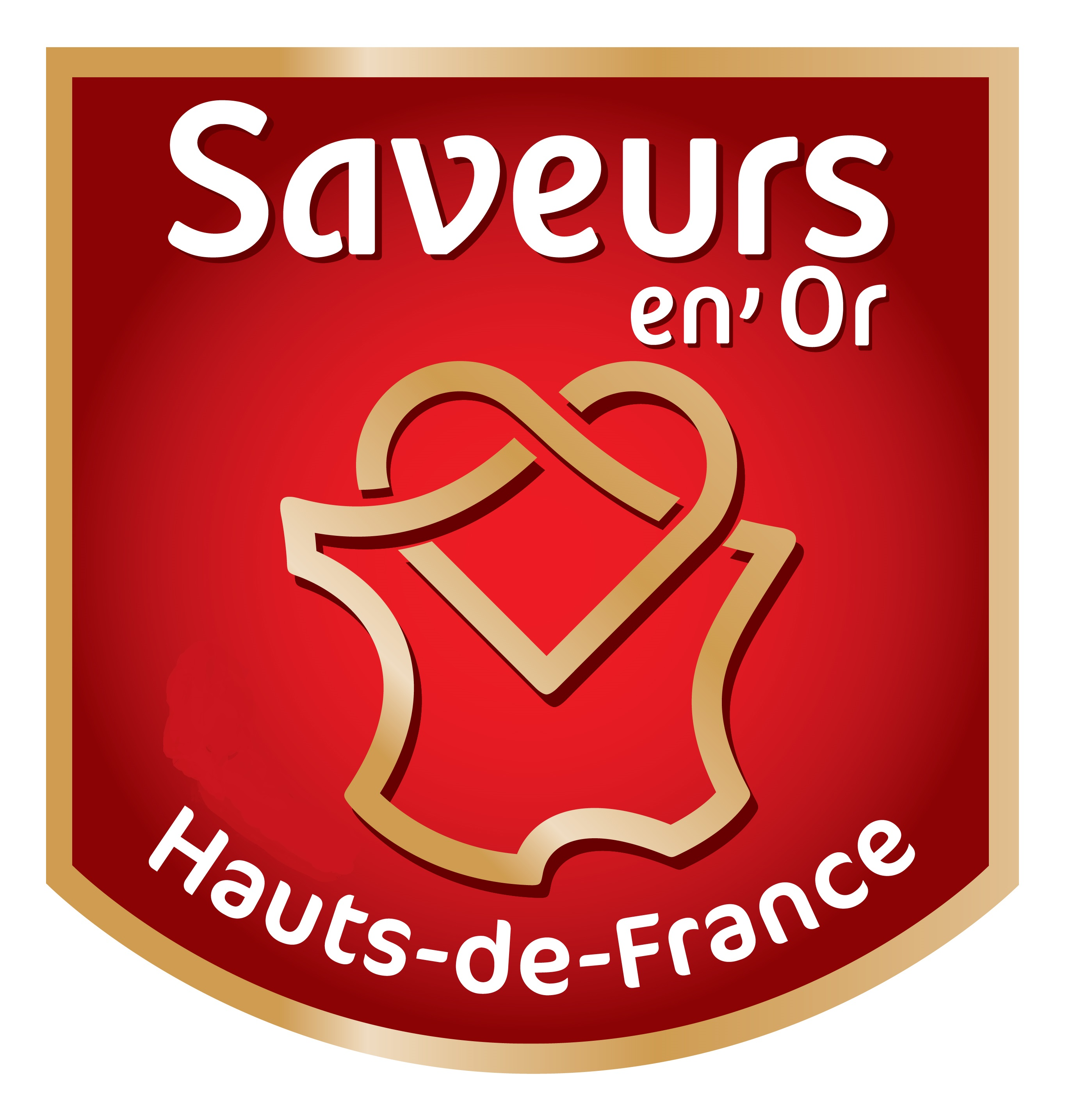 logo 11 mai 2017 seo